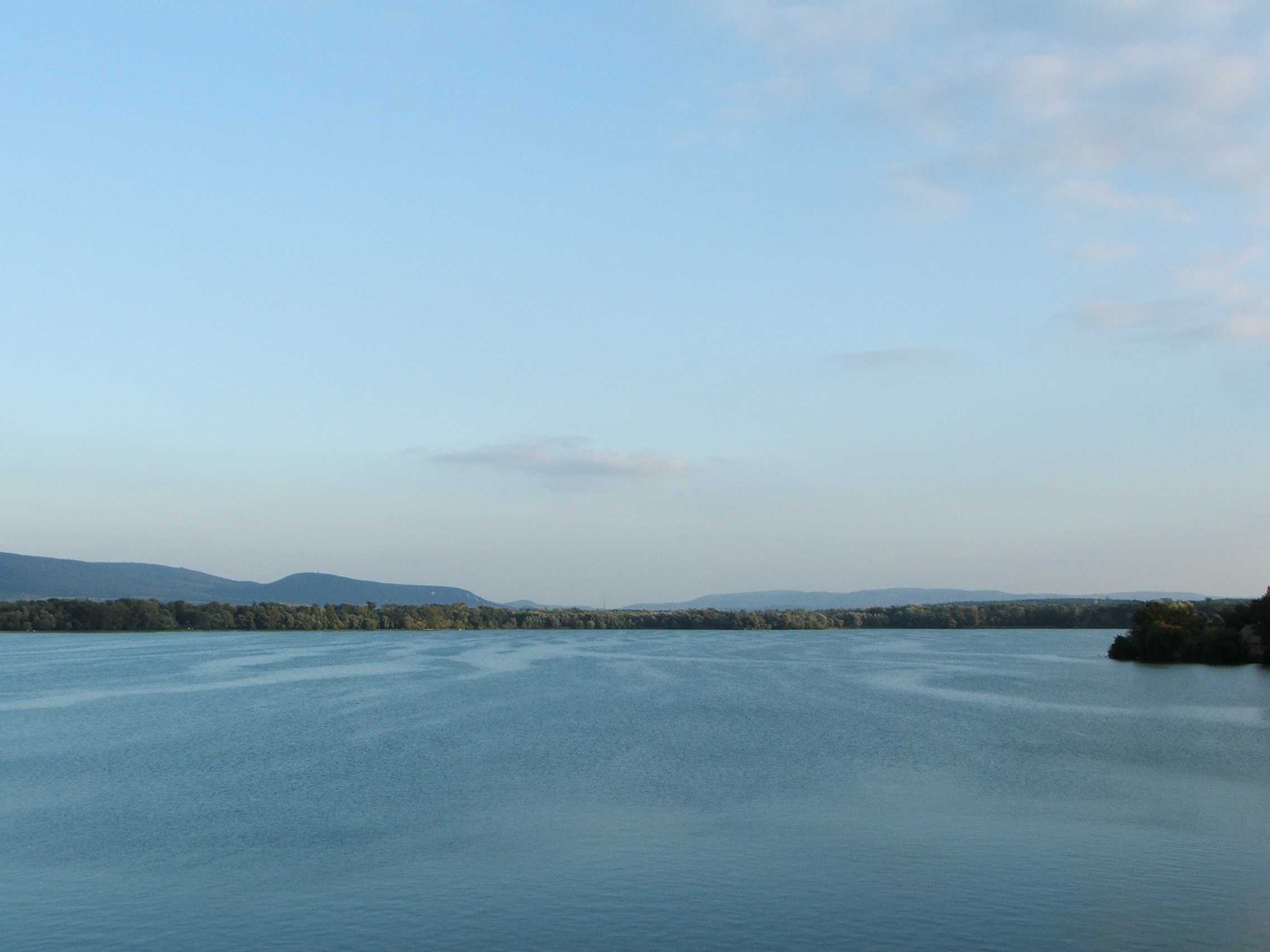 Öreg-tó (Old Lake), Tata Photo: József Süveg (2005)